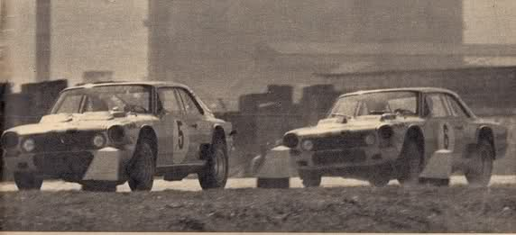 Alberto Rodríguez Larreta y Eduardo Rodríguez Canedo conduciendo dos IKA Torino en la VI Vuelta de San Nicolás. Rodríguez Larreta ganaría la carrera y Rodríguez Canedo abandonaría.